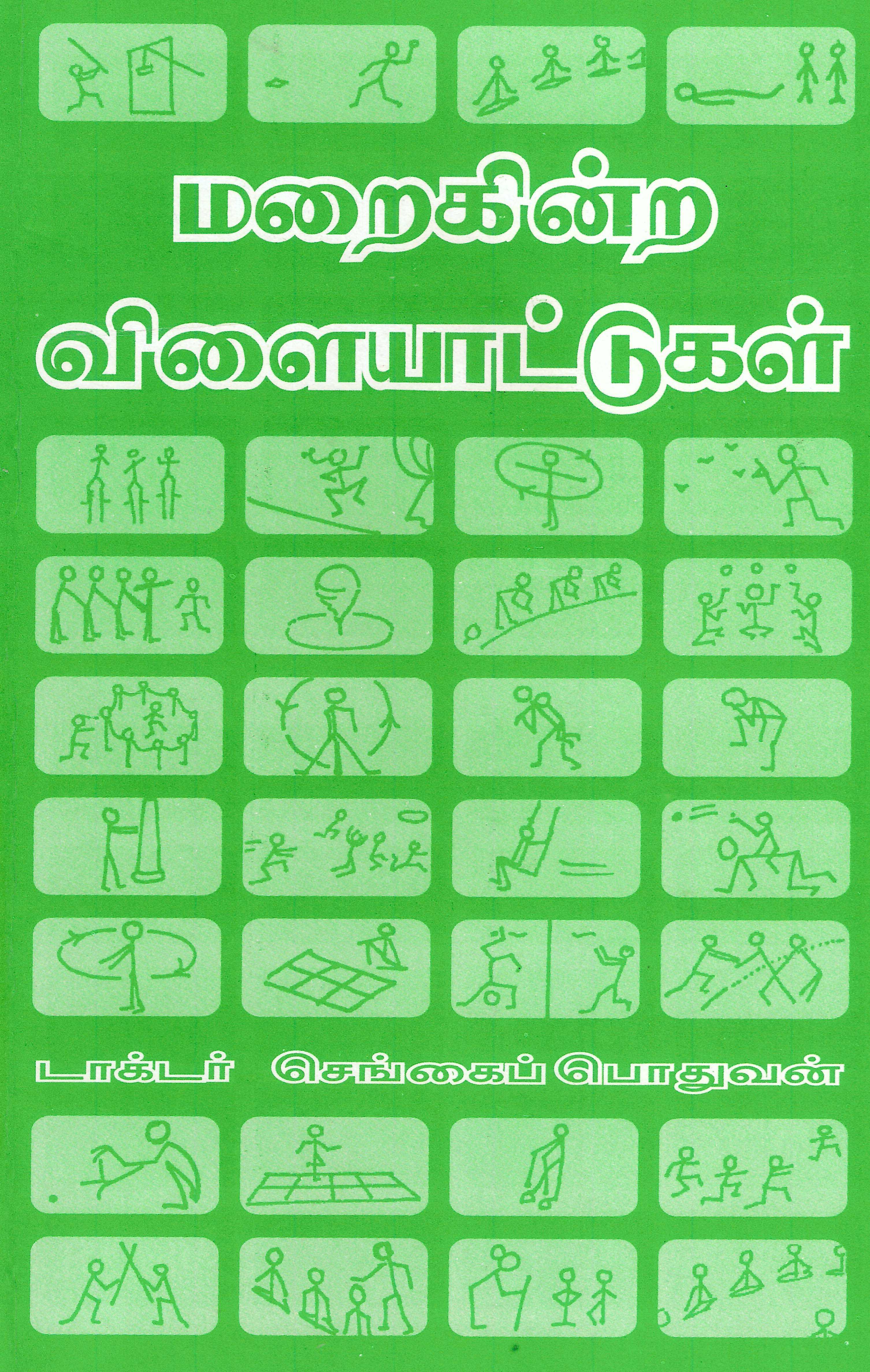 Indigenous games of India (line symbols) 2 symbolic lines of some of the games, Source are scanned from the book “vanishing games of Tamil Nadu” மறைகின்ற விளையாடுகள் published in 2002. The author of the book is the up-loader